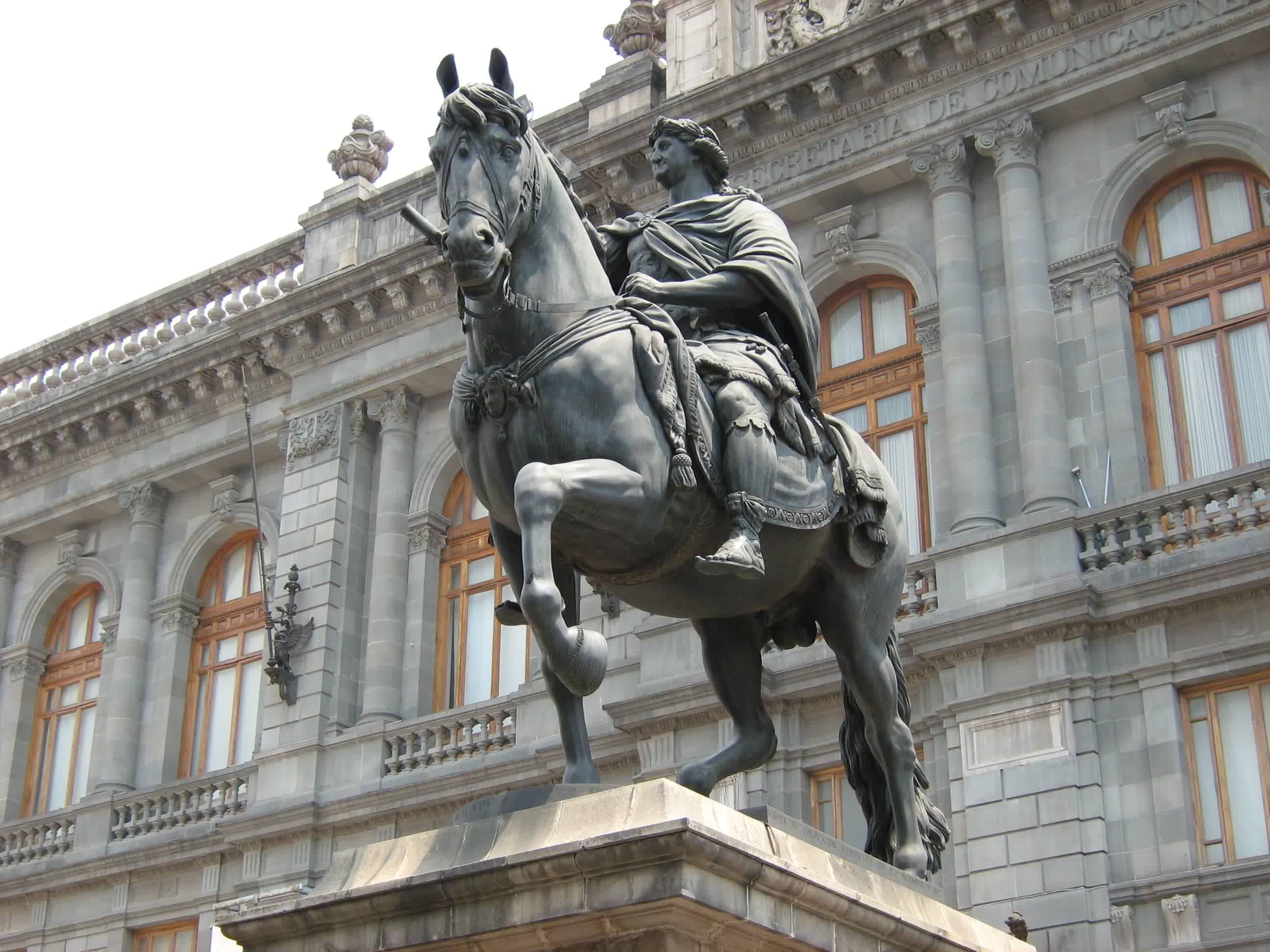 Estatua ecuestre de Carlos IV de España en la Plaza Manuel Tolsá, Ciudad de México. Fue diseñada por el escultor y arquitecto Manuel Tolsá y se inauguró el 9 de diciembre de 1803.